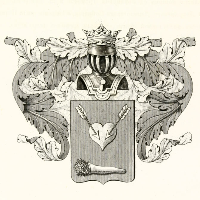 Герб рода Палицыных (потомства Ивана Богдановича Палицына), Общий гербовник, ч. 9, с. 88